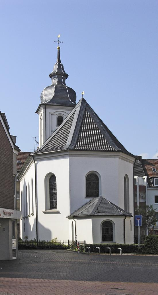 Evangelical citychurch Dinslaken